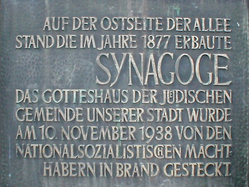 Detail der Synagogen-Gedenktafel an der Allee in Heilbronn.